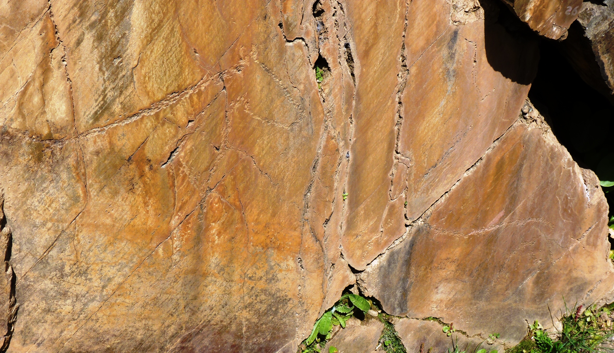 Conjunto dos sítios arqueológicos no Vale do Rio Côa - Núcleo de arte rupestre da Canada do Inferno/Rego da Vide